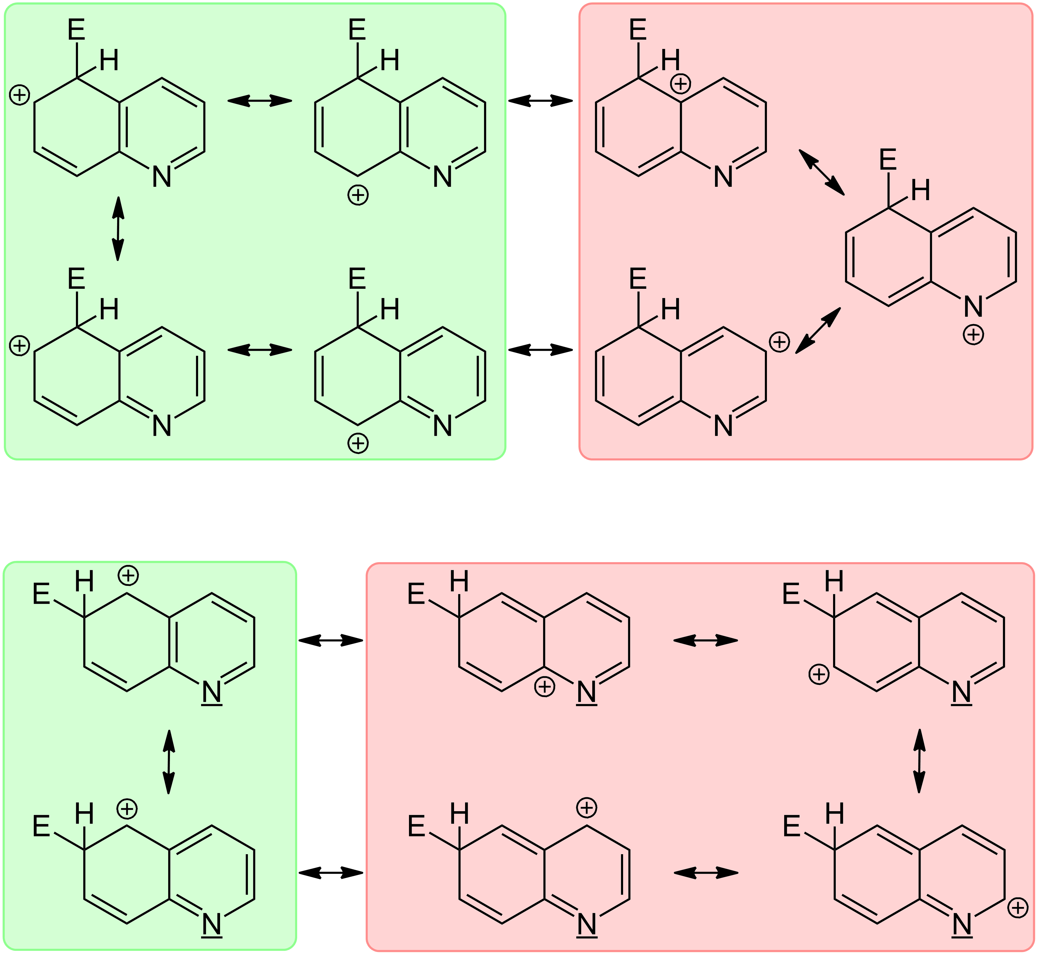 Mesomere Grenzstruktuzren der elektrophilen Substitution an Chinolin in 5- und 6-Position